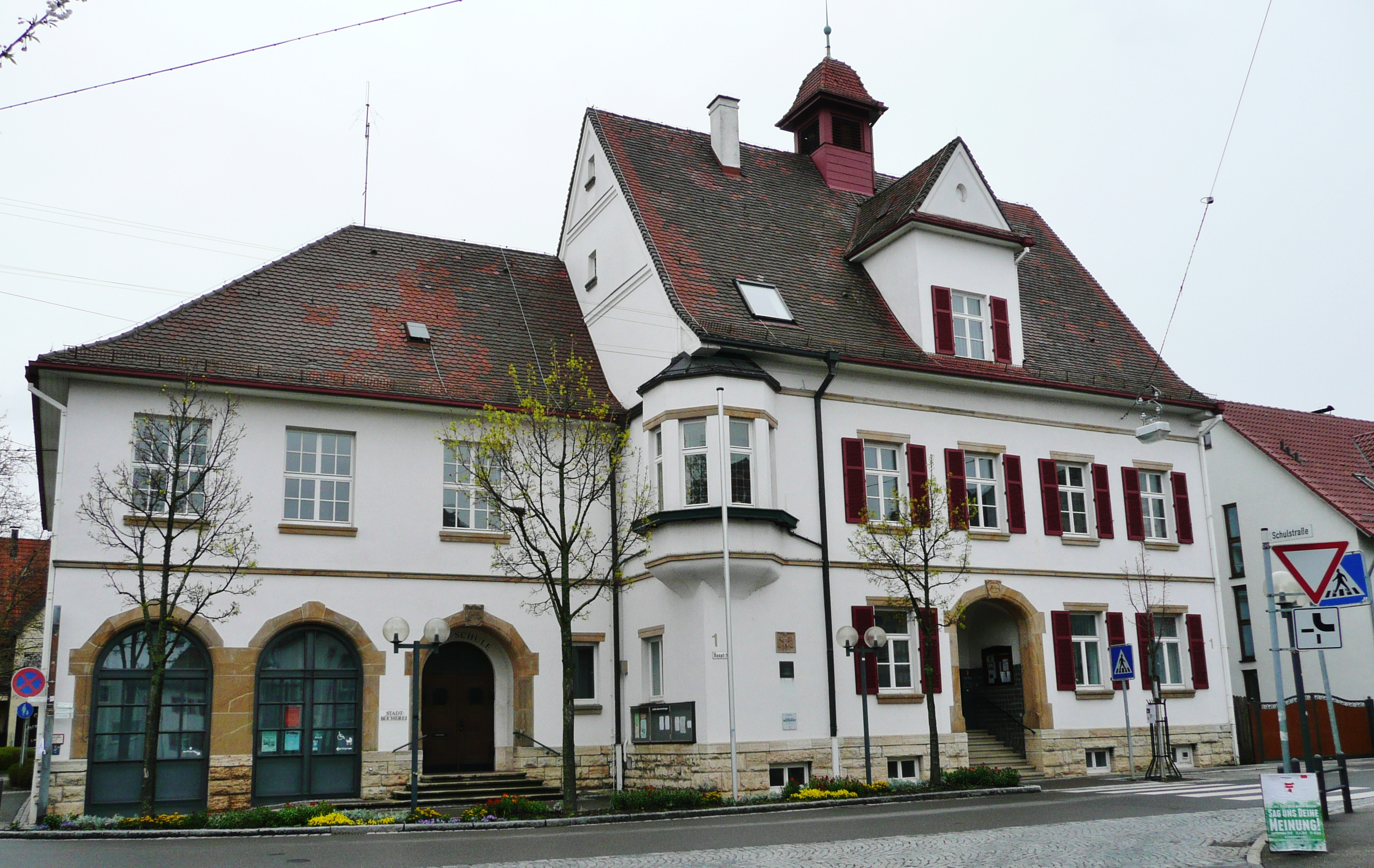 Ehemaliges Schul- und Rathaus in Oeffingen, erbaut 1911/1912.